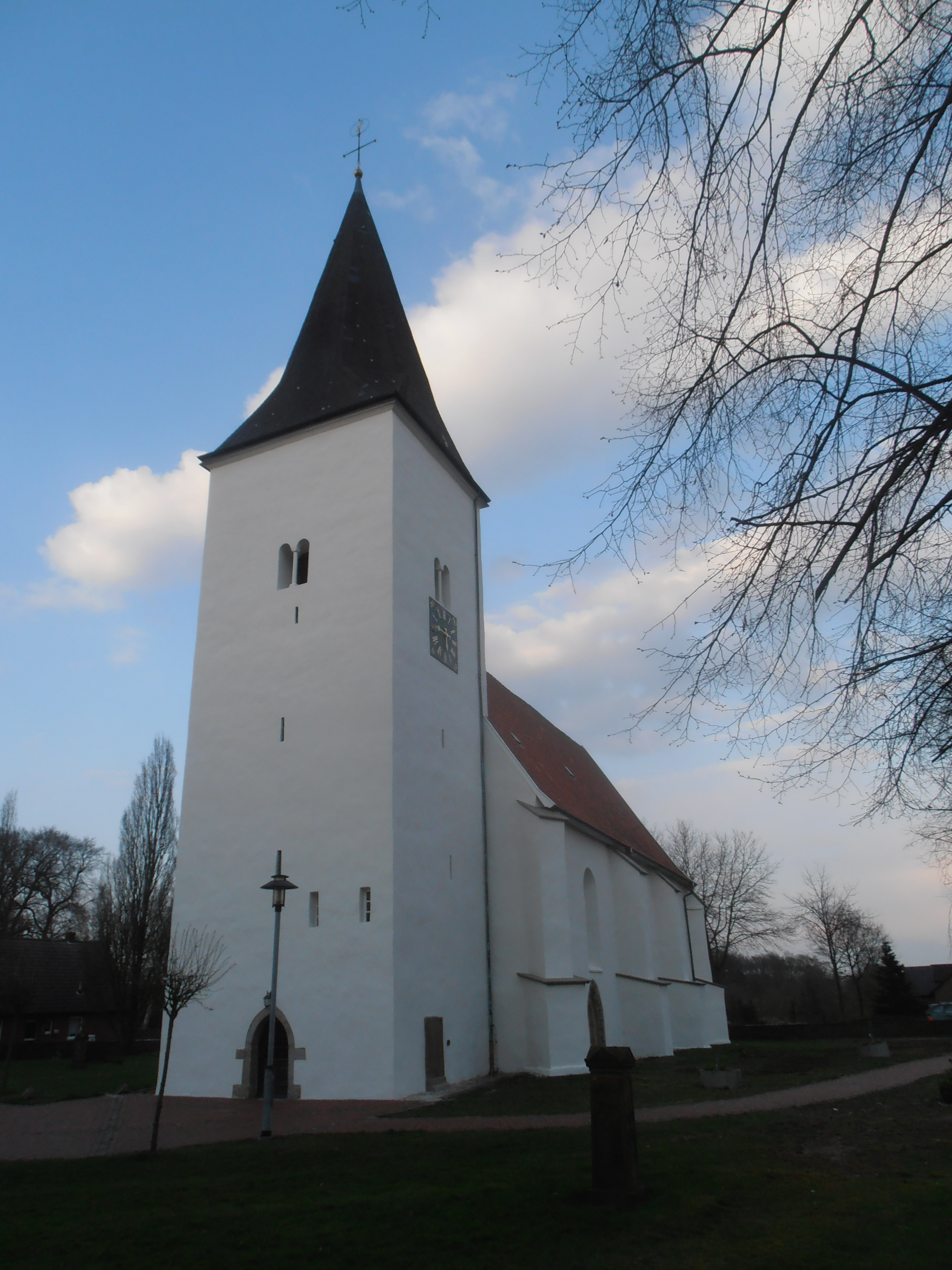 Die Marienkirche in Ueffeln im Norden des Landkreises Osnabrück in Niedersachsen; Blick von SW